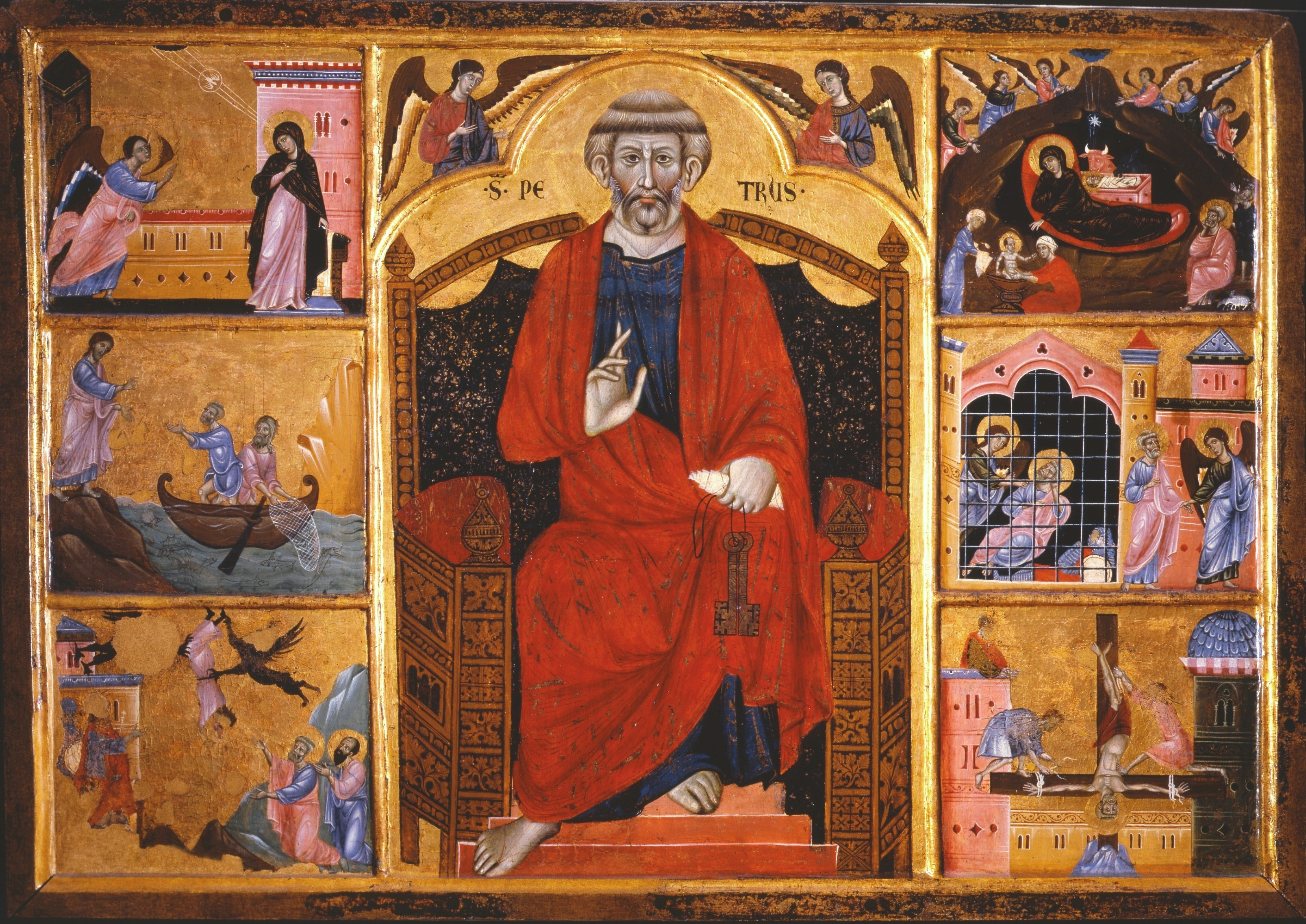 Guido di Graziano. St. Peter. Pinacoteca Nazionale di Siena.